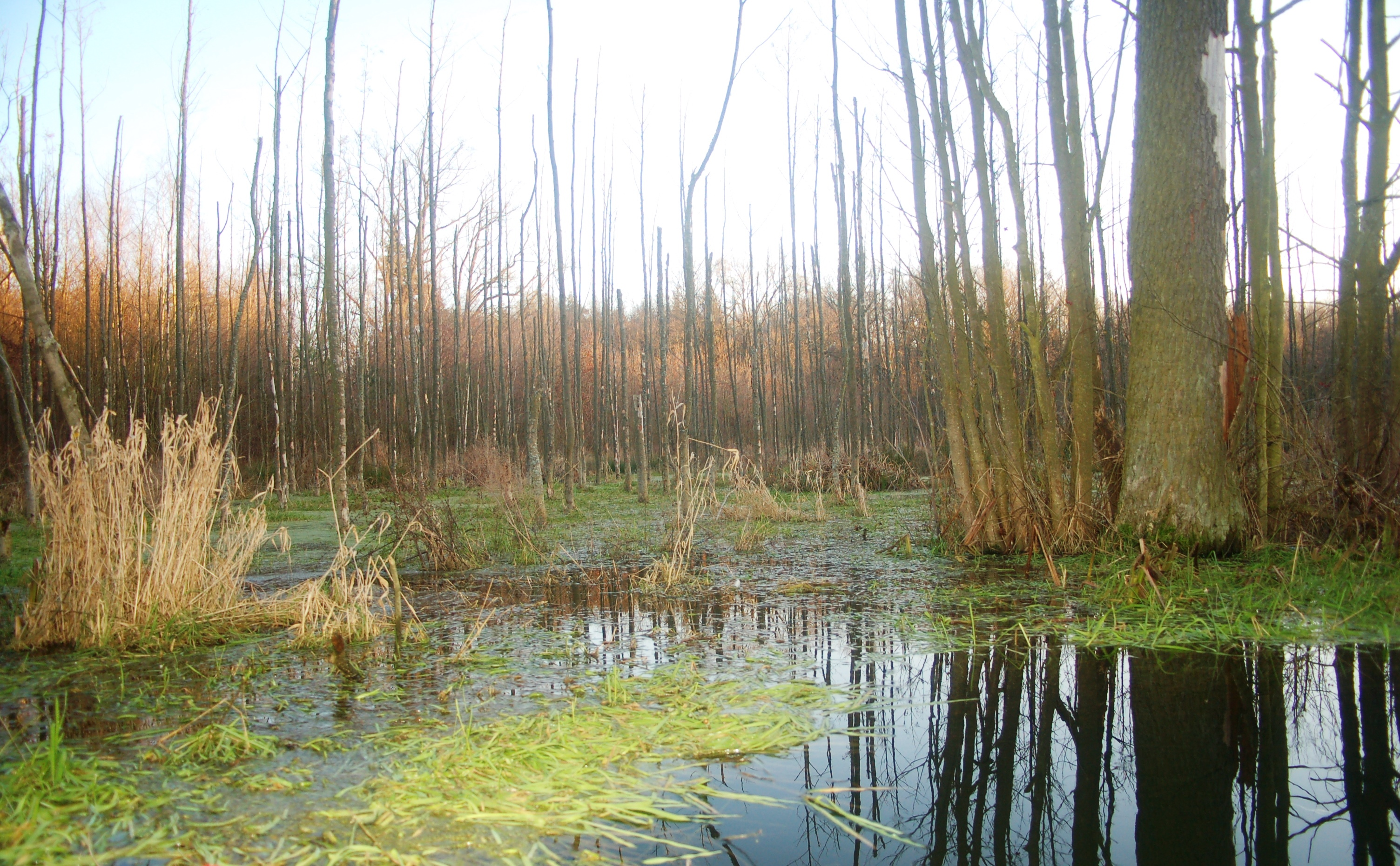 Potok Sucha - prawy dopływ Szprotawy, powiat żagański, województwo lubuskie, ekstremalna trasa kajakowa